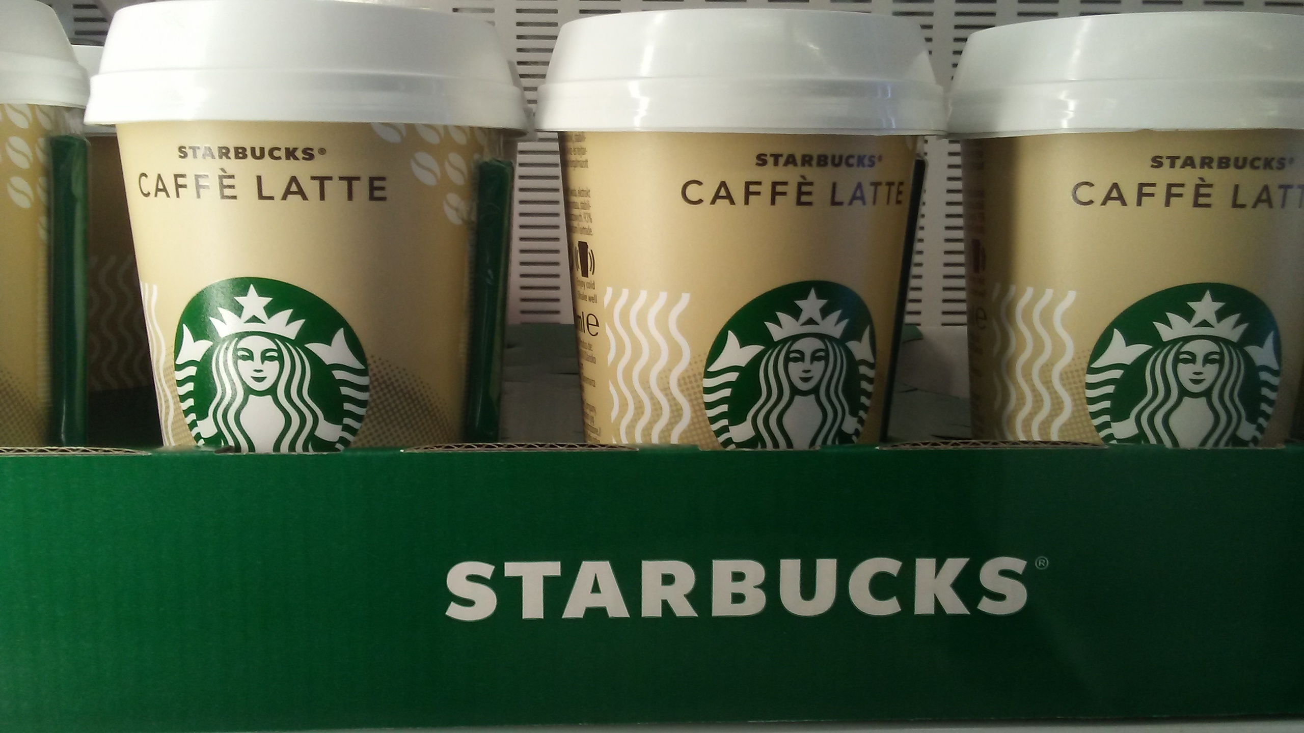 Lody marki Starbucks